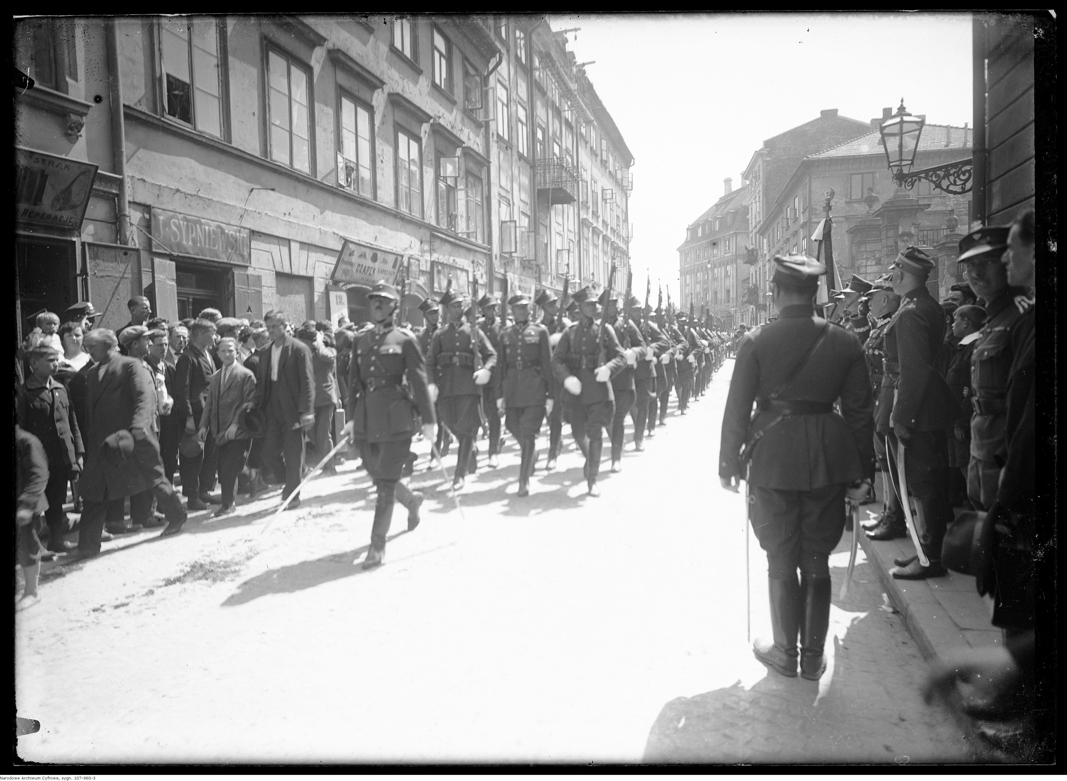 Defilada Kompanii Przybocznej na ulicy Podwale. Widok w kierunku placu Zamkowego.